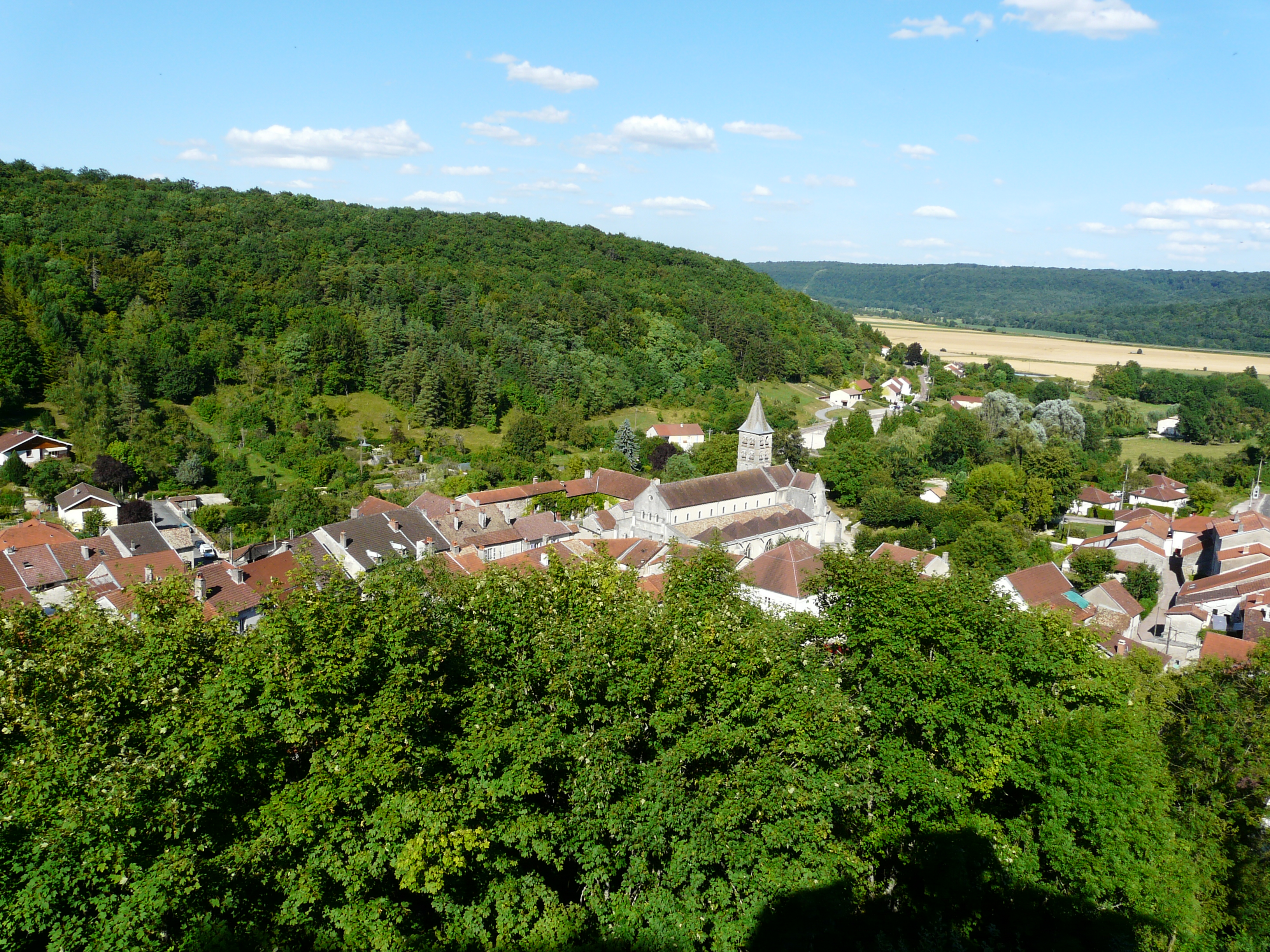 Vignory : le bourg dans son vallon